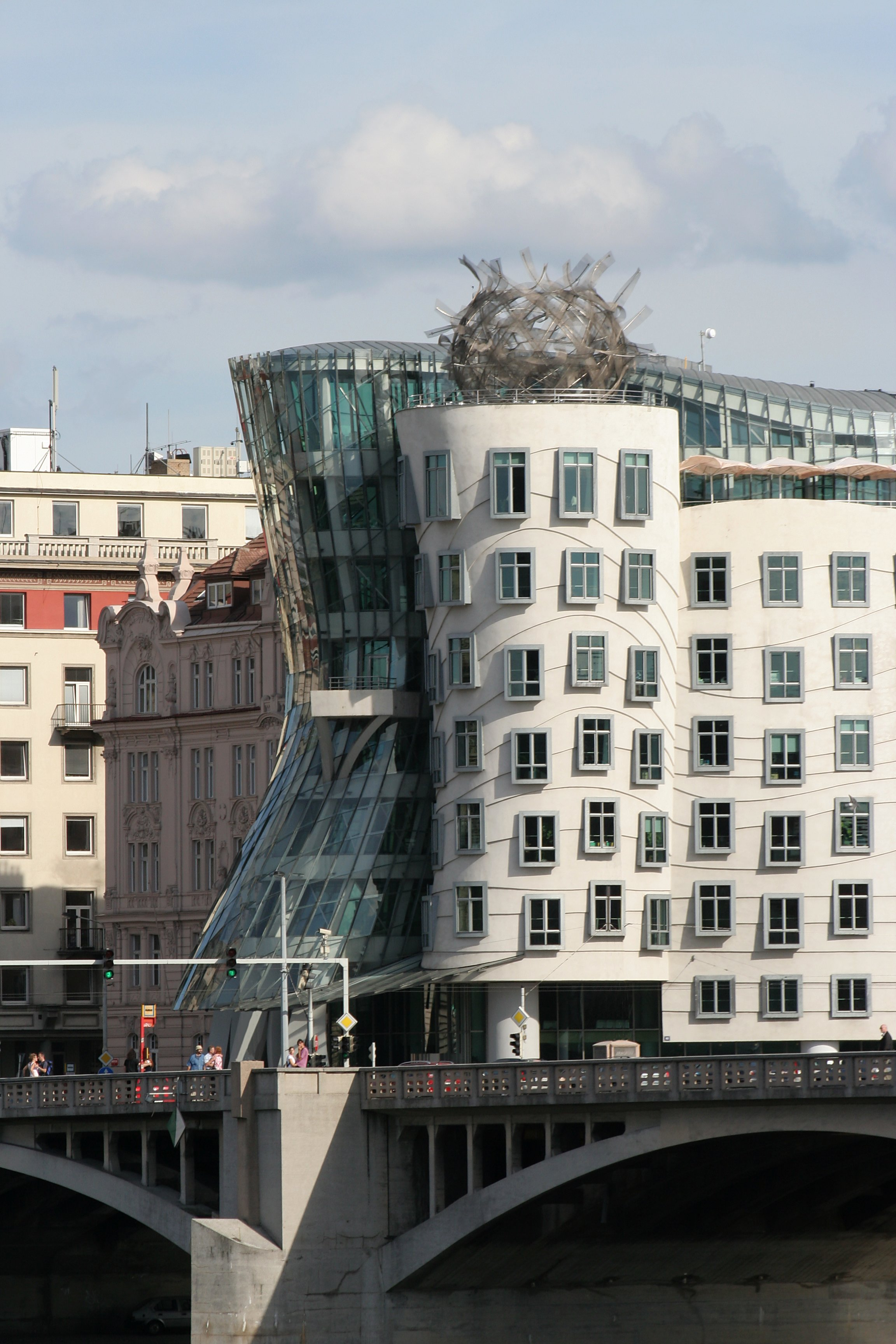 Tančící dům (Dancing house), Nové Město, Praha - some annoying street lamps removed.